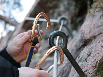 Utrustning